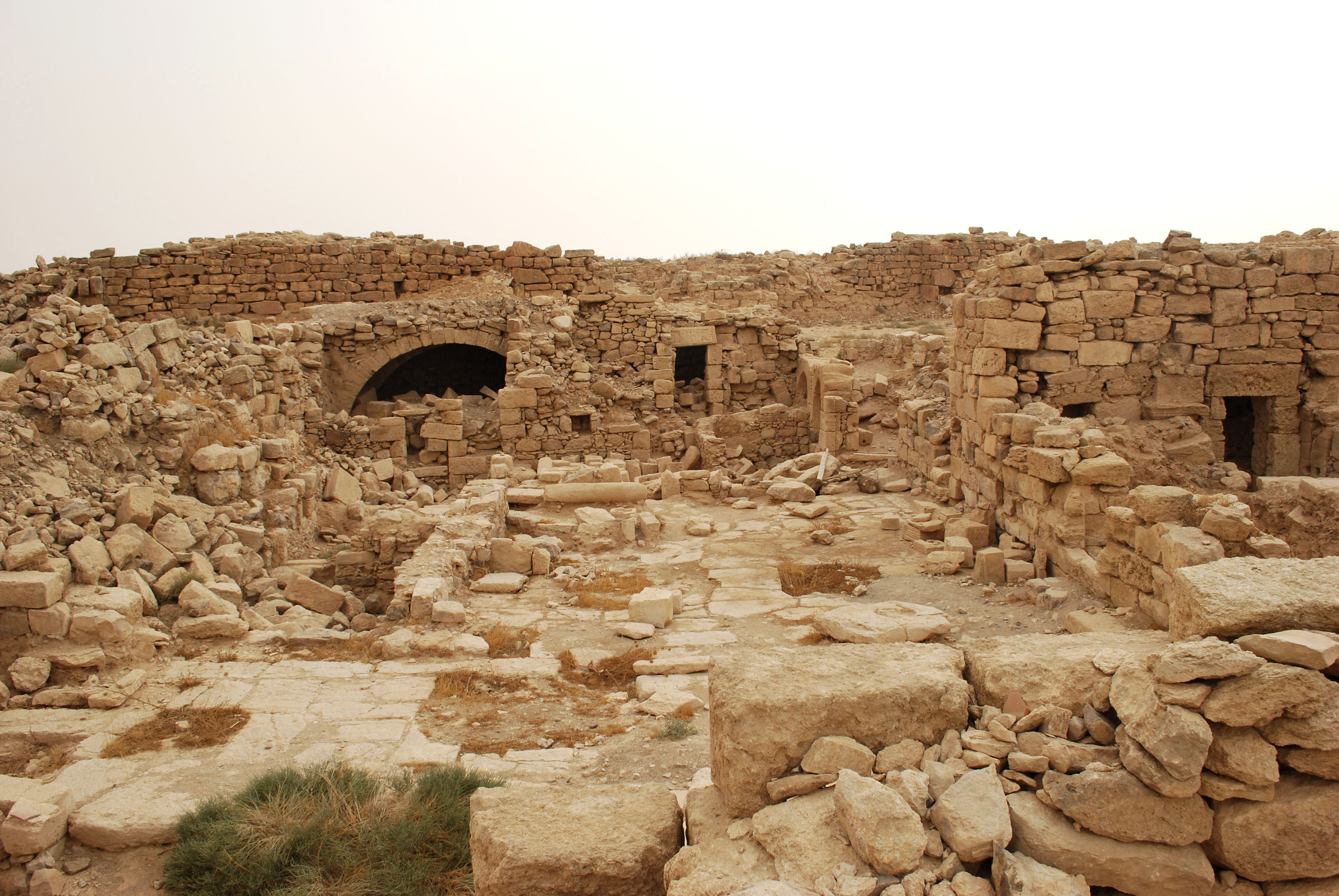 Vue des vestiges de la ville de Umm ar-Rasas.